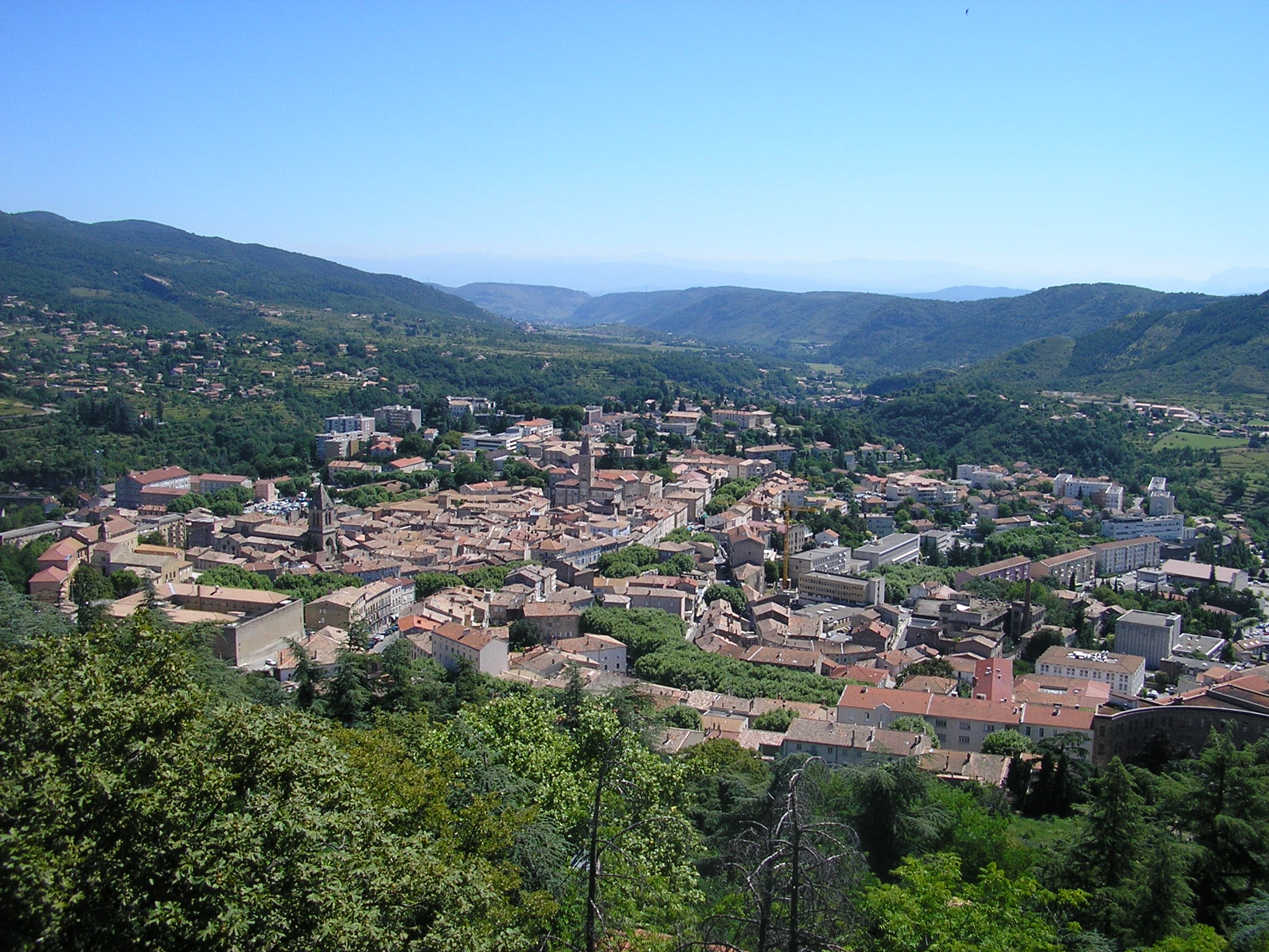 Vue de Privas depuis le Montoulon